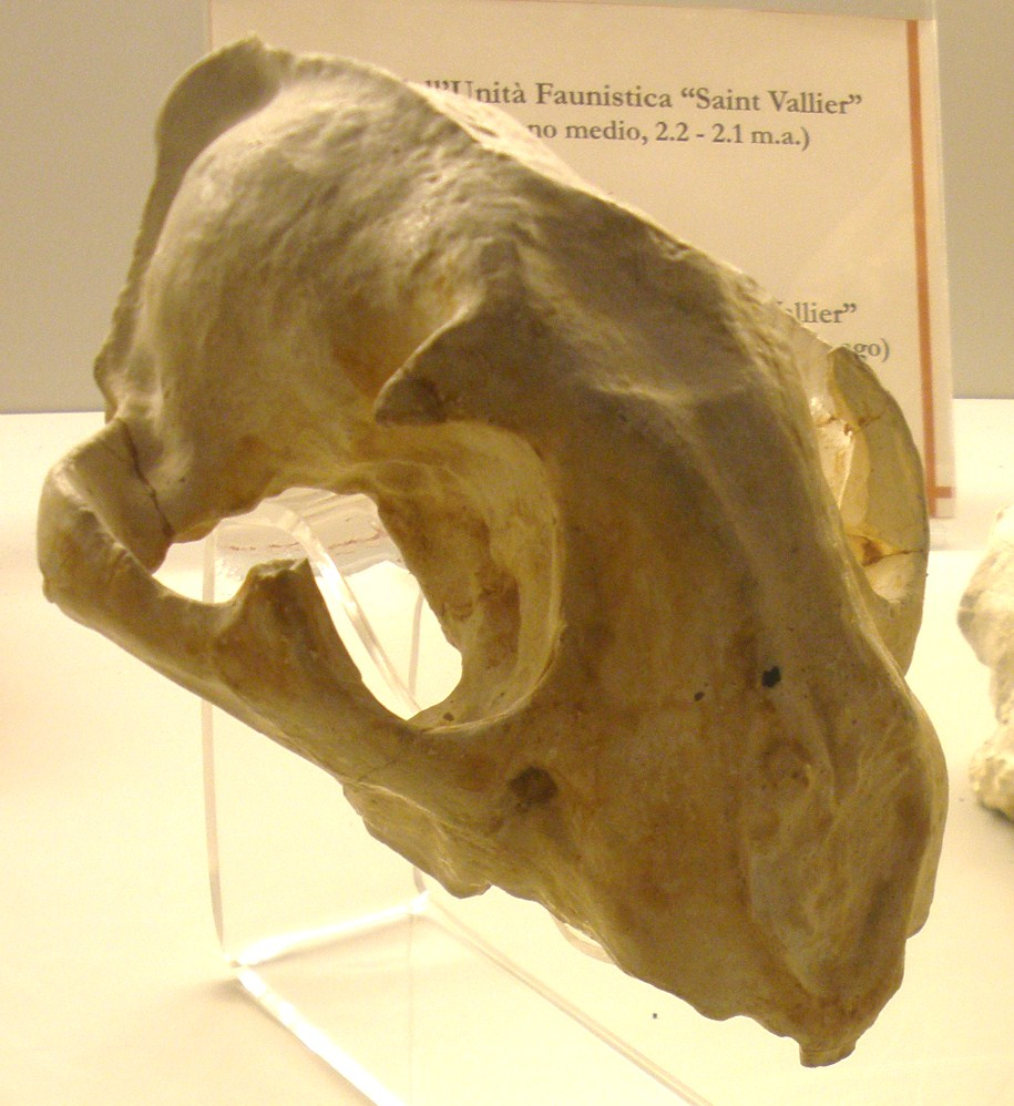 Fossil of Puma schaubi, an extinct mammal -- Topok the picture at Museo di Paleontologia di Firenze